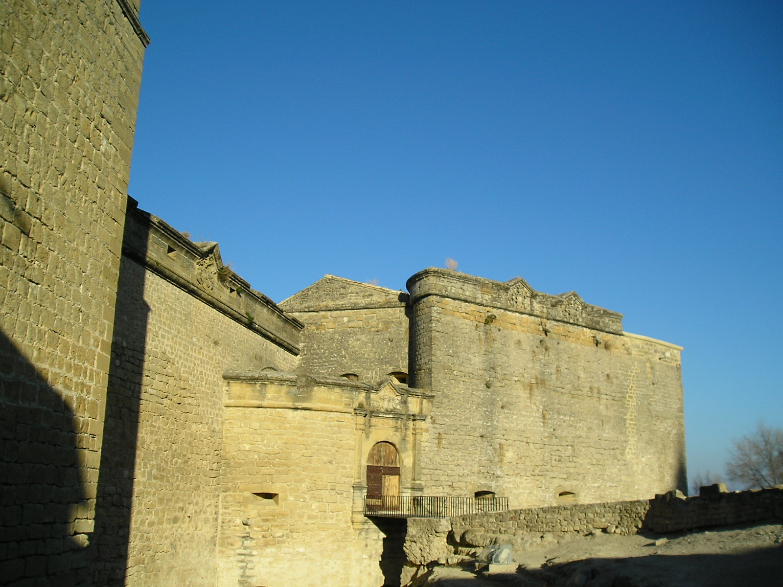 Vista lateral del Castillo de Sabiote